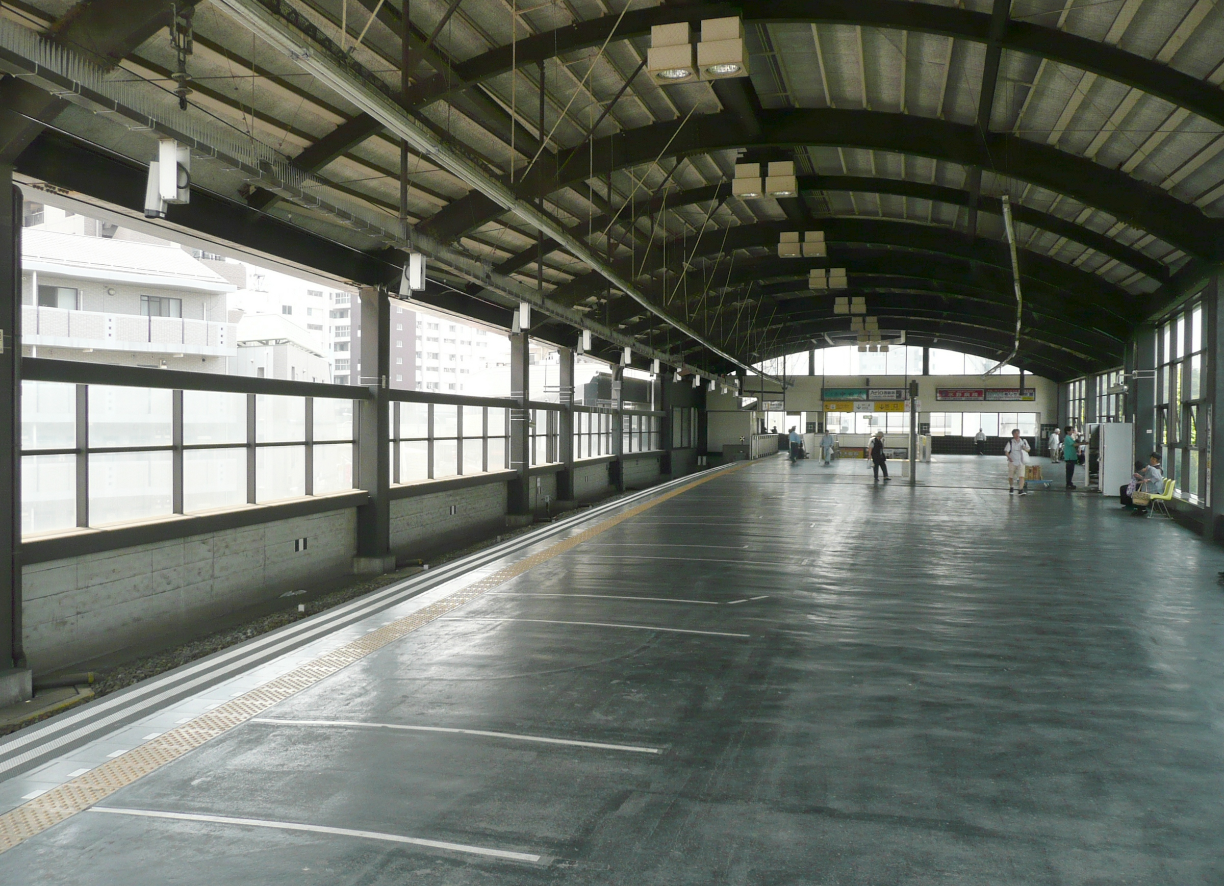 大師前駅ホーム（西新井方から出入口側を見る）